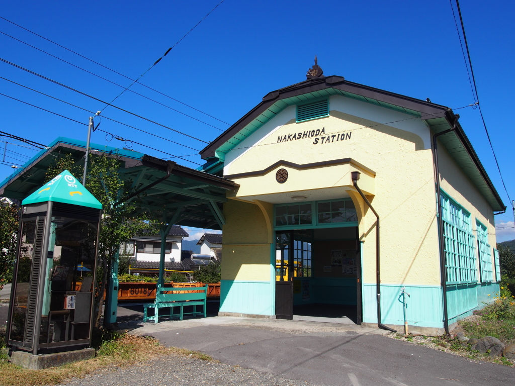 改修後の駅舎(2012年10月8日)